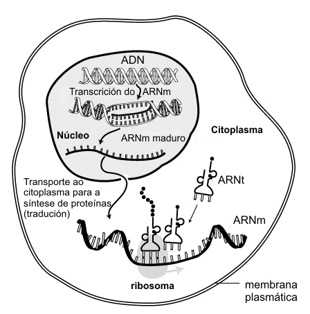 mRNA maduration